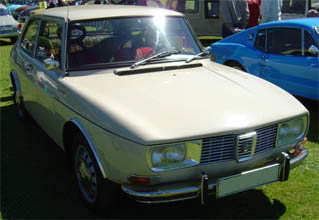 Saab 99, vit, första generationen Saab 99, tvådörrarsversion